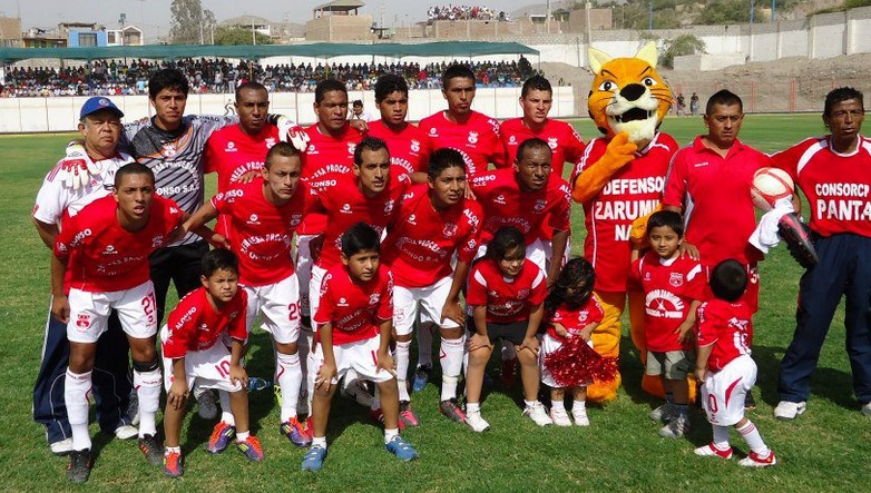 Equipo glorioso del defensor Zarumilla. Etapa nacional de la copa Perú 2012.